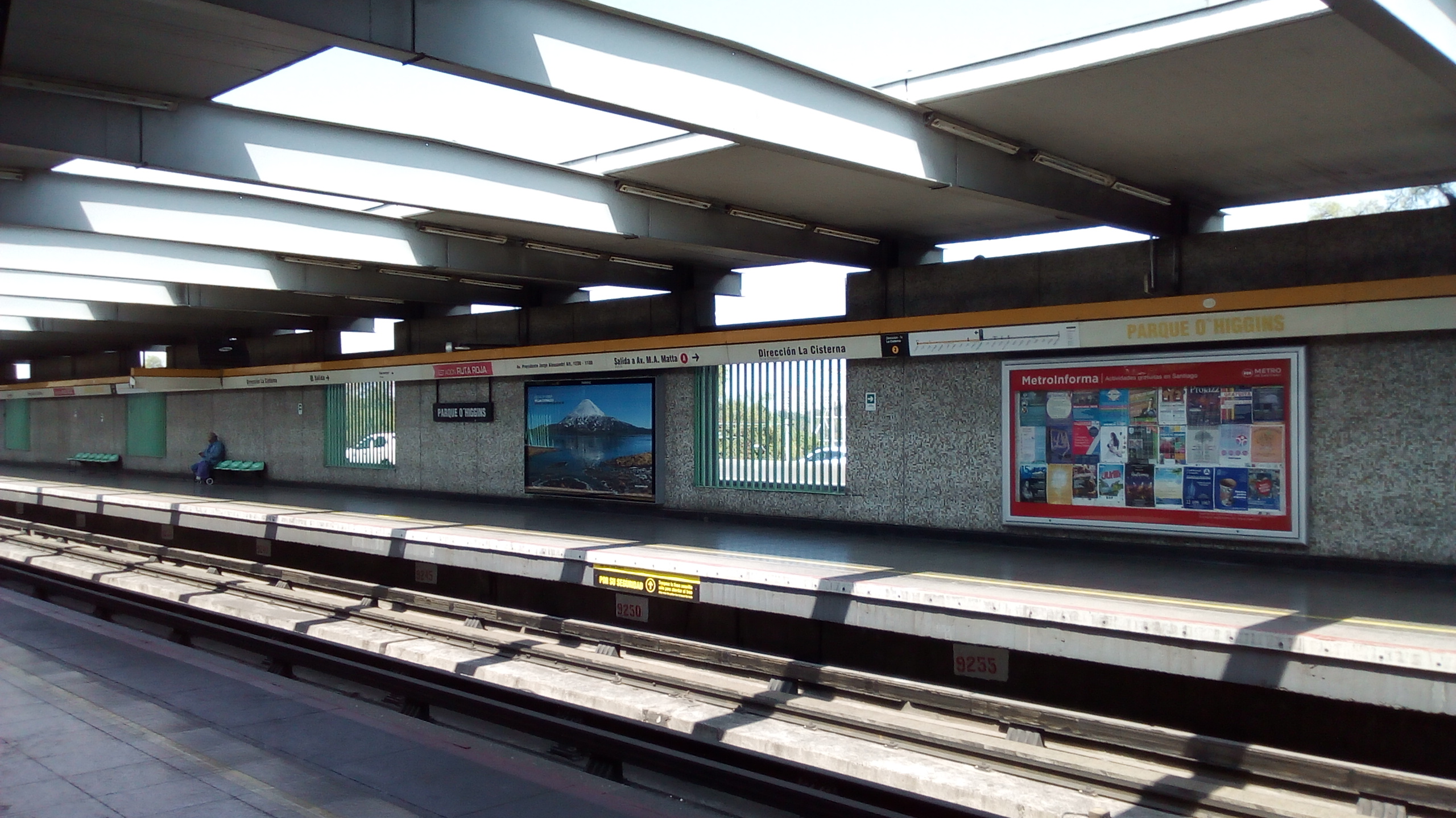 Vista de los andenes de la estación Parque O'Higgins del Metro de Santiago.